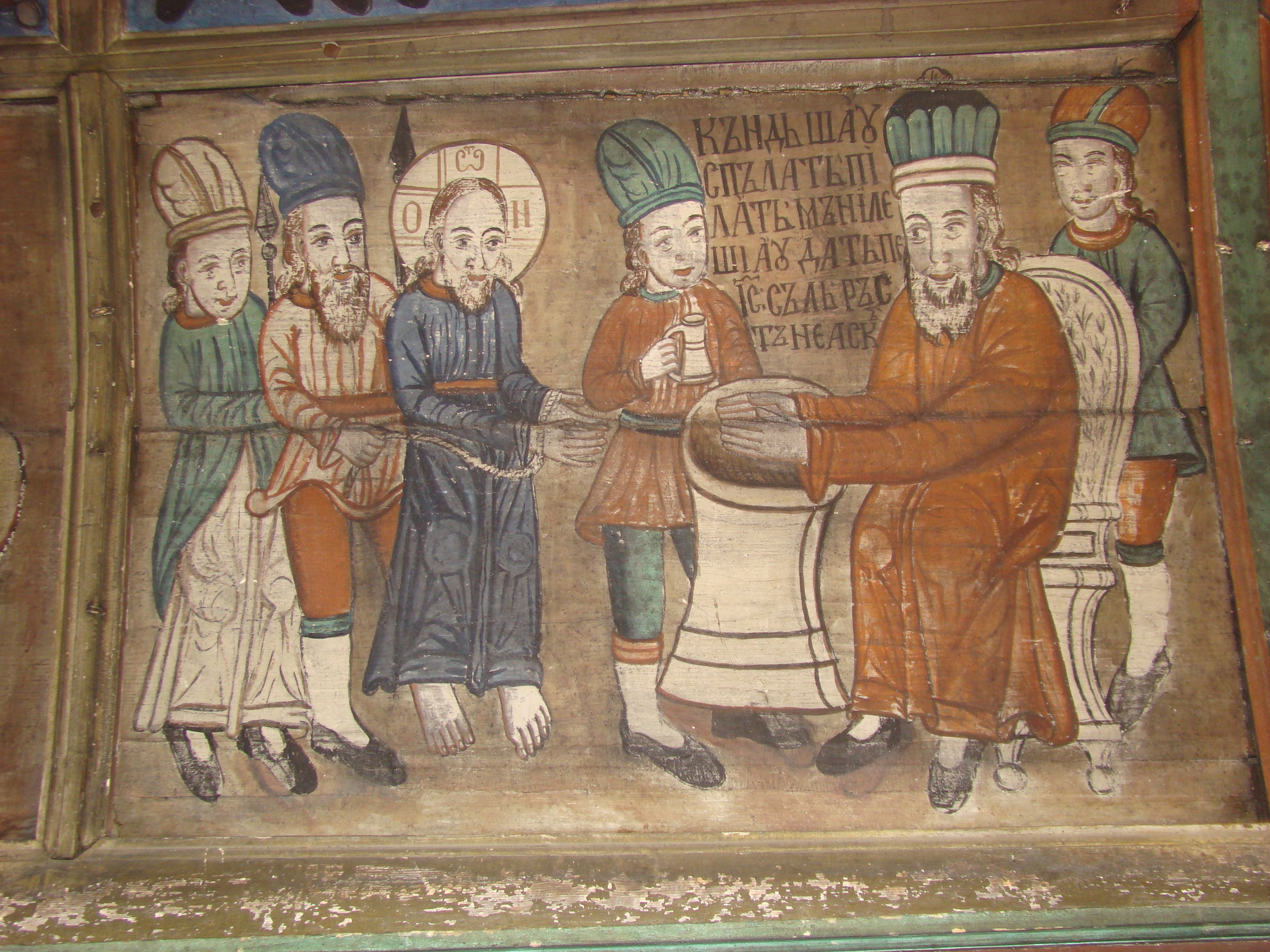 Biserica de lemn „Sfinții Arhangheli” din Botean, județul Bihor